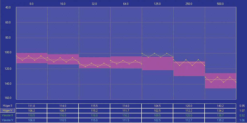 Exempel på ett normalt vibrogram med en kurva som befinner sig inom eller över det rosa området som motsvarar ett åldersmatchat normalmaterial. Bra känsel indikeras av en kurva som ligger över det rosa området. Om kurvan ligger under det rosa området på alla frekvenser har man en patologisk kurva som innebär att det föreligger en neurologisk skada.